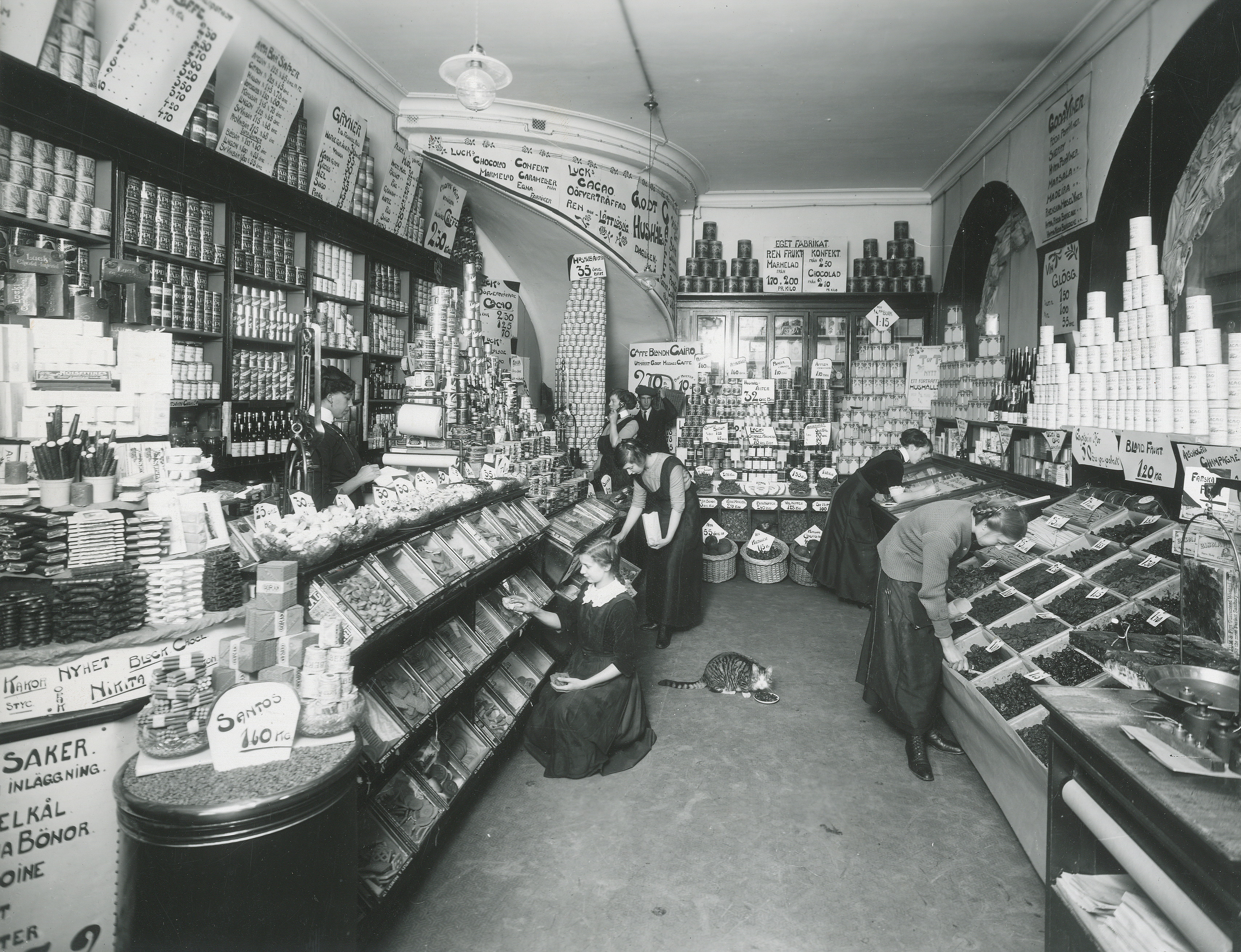 Percy Lucks delikatessaffär Kornhamnstorg 59B